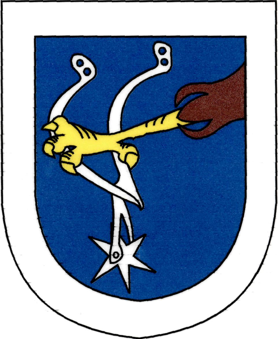 Znak obce Braškov